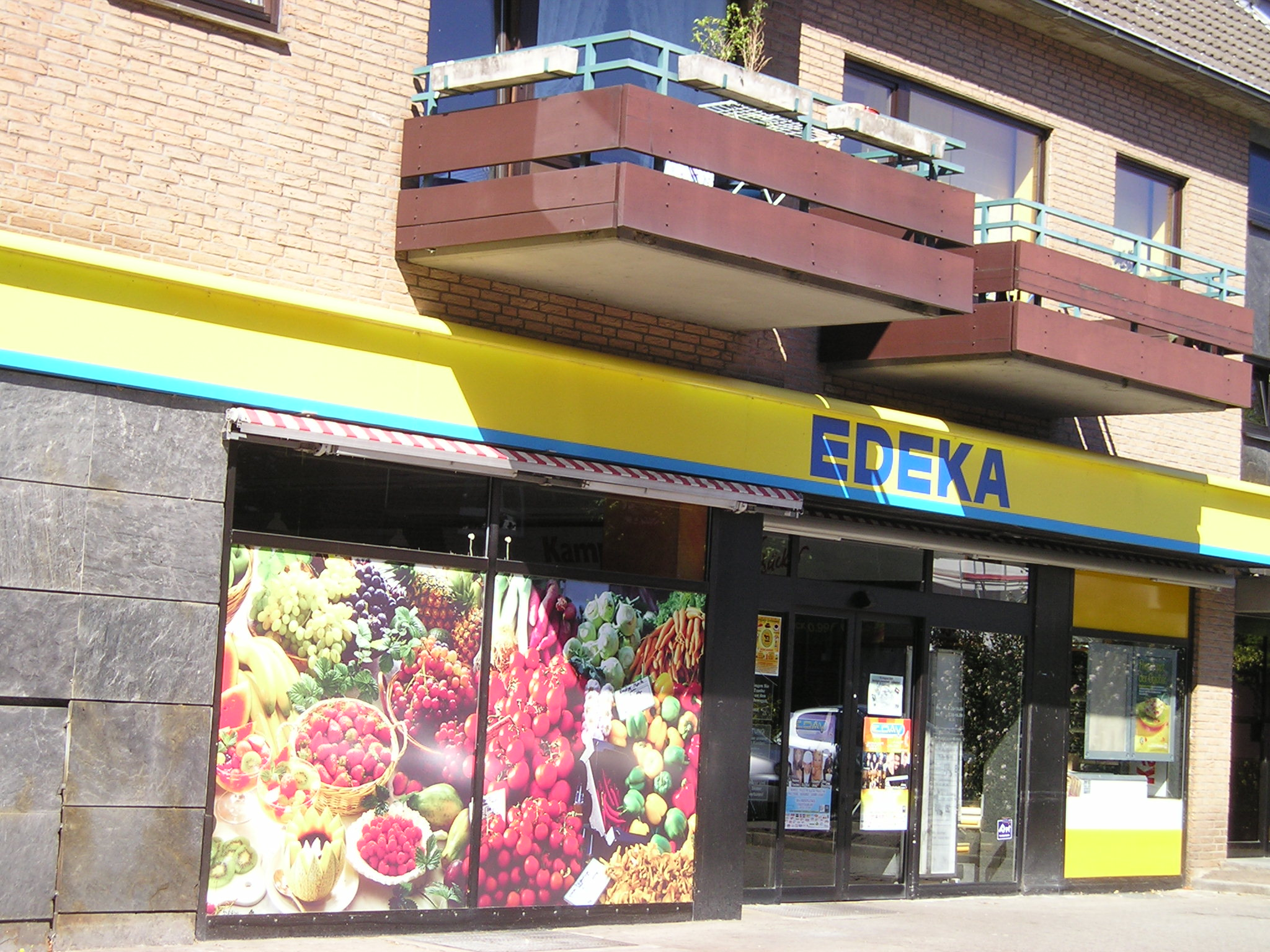 Edeka supermarket in Düsseldorf-Urdenbach